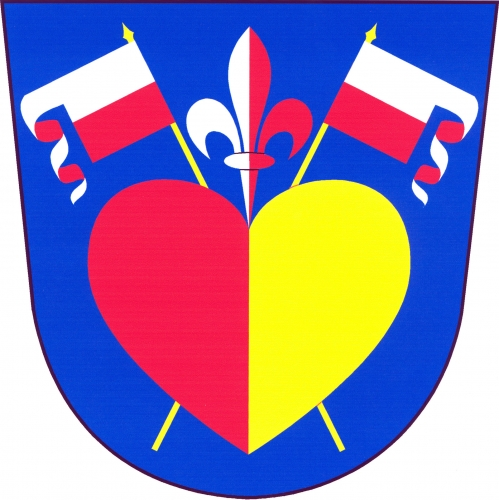 znak, Hluboké Mašůvky, okres Znojmo